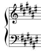 Znaki przykluczowe w tonacji Fis-dur